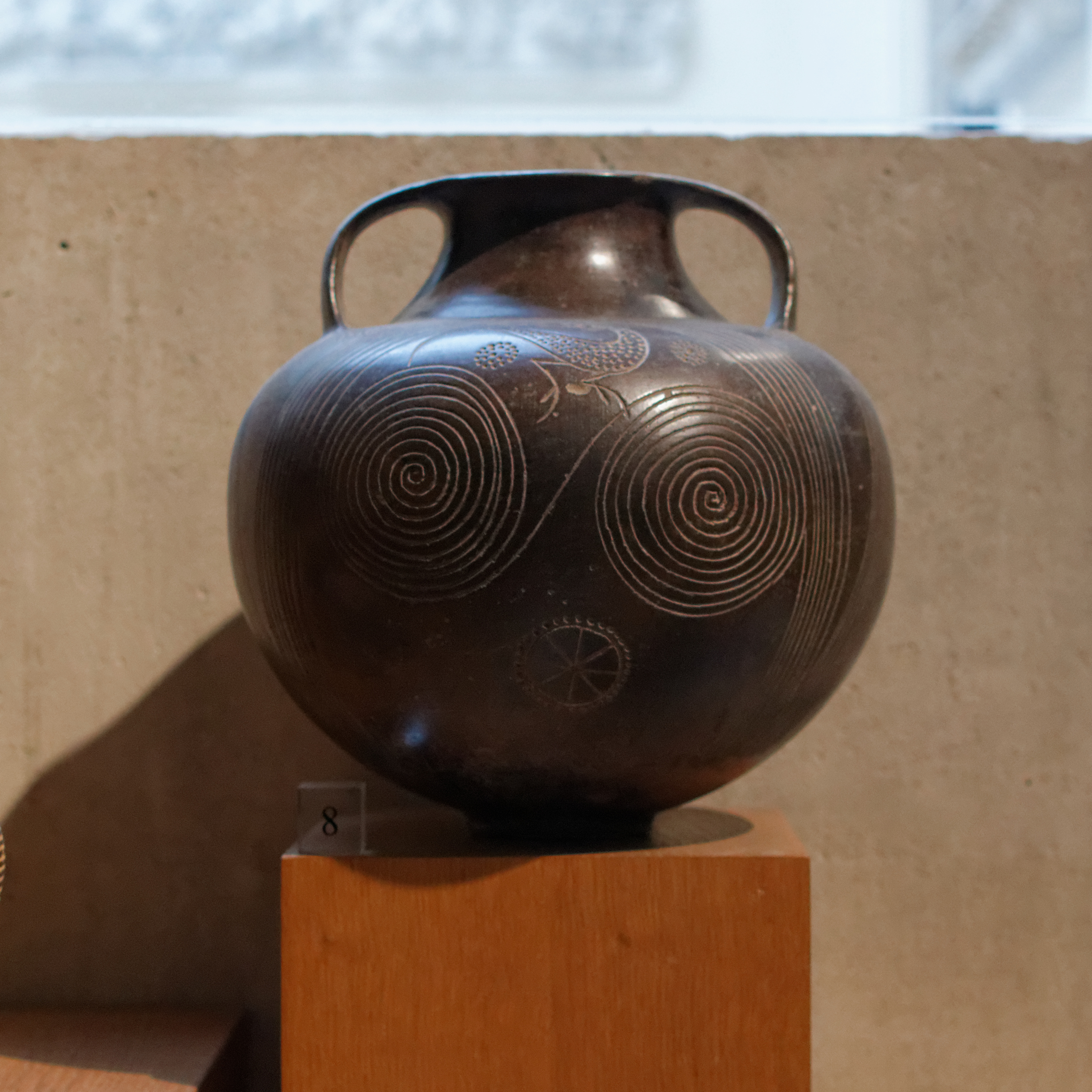 Impasto (première moitié du VIIe siècle avant J.-C.), amphore à décor incisé : spirales et oiseaux.